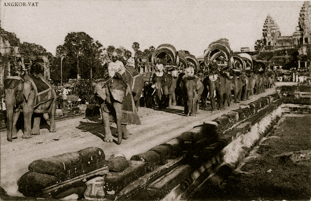 angkor-vat sur carte postale ancienne